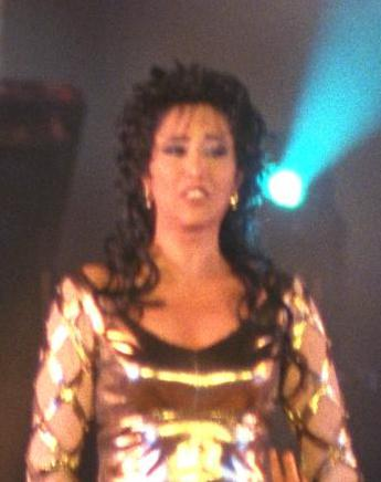 SINGER OFRA HAZA AT THE JUBILEE CHIMES PERFORMANCE AT GIVAT RAM, JERUSALEM, IN HONOR OF THE 50TH INDEPENDENCE DAY OF THE STATE OF ISRAEL. הזמרת עופרה חזה מופיעה בחגיגות היובל בגבעת רם, ירושלים, לכבוד יום העצמאות ה-50 של מדינת ישראל Photo: AMOS BEN GERSHOM, 04/30/1998